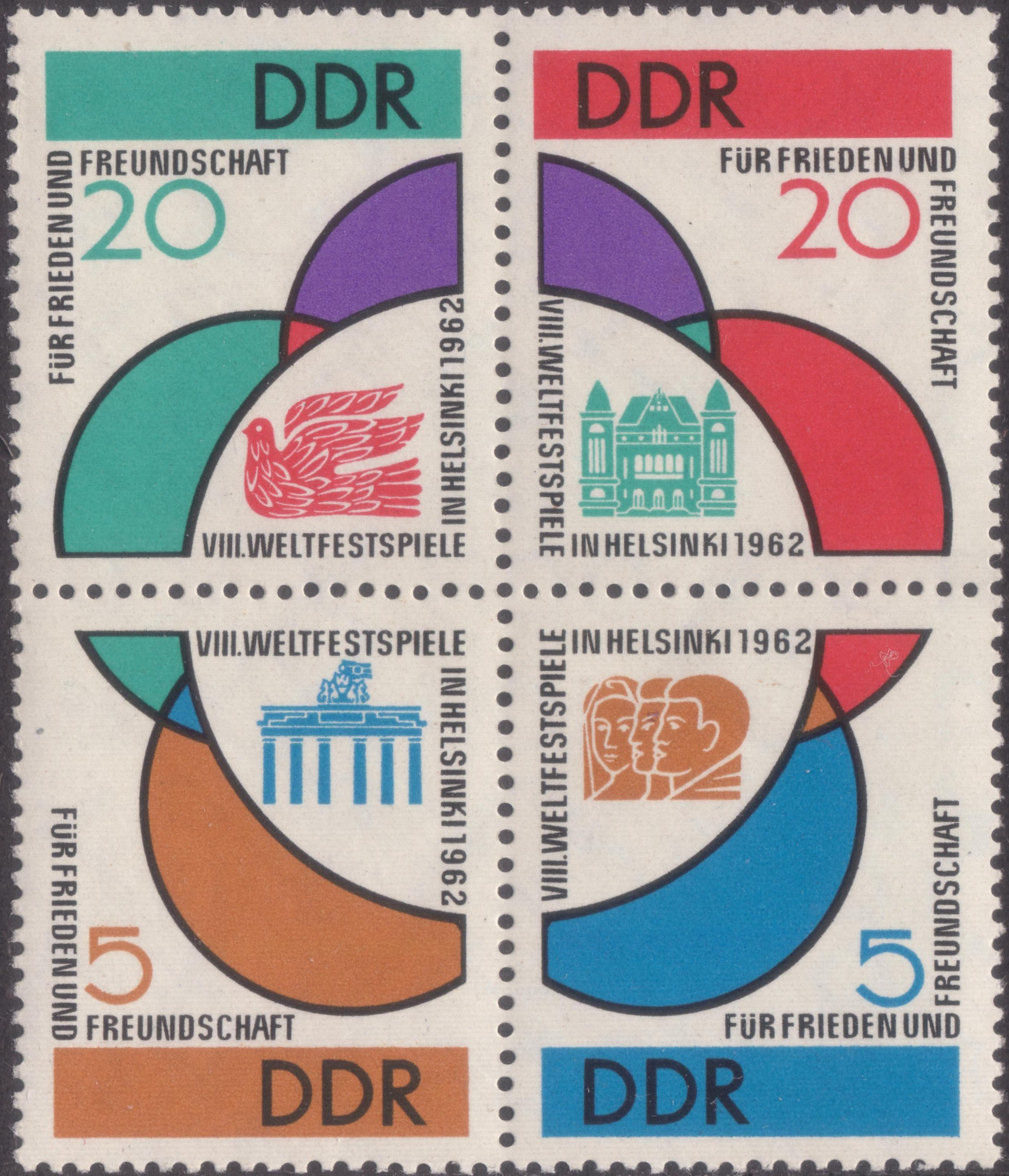 Briefmarke / stamp DDR 1962 Michel 901-904